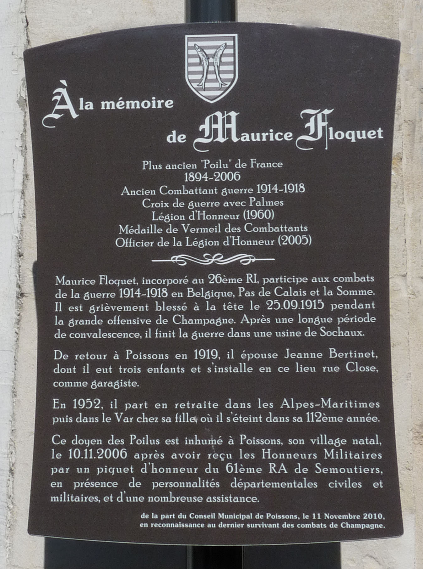 Plaque commémorative dédiée à Maurice Floquet, poilu mort à 111 ans (Poissons, Haute-Marne)